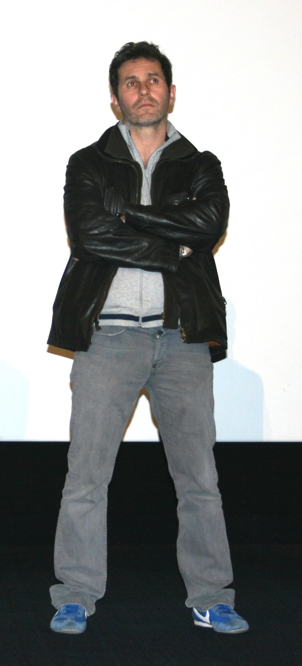 Serge Hazanavicius à l'avant-première d'Il y a longtemps que je t'aime diffusée à l'UGC Ciné Cité Bercy, à Paris.